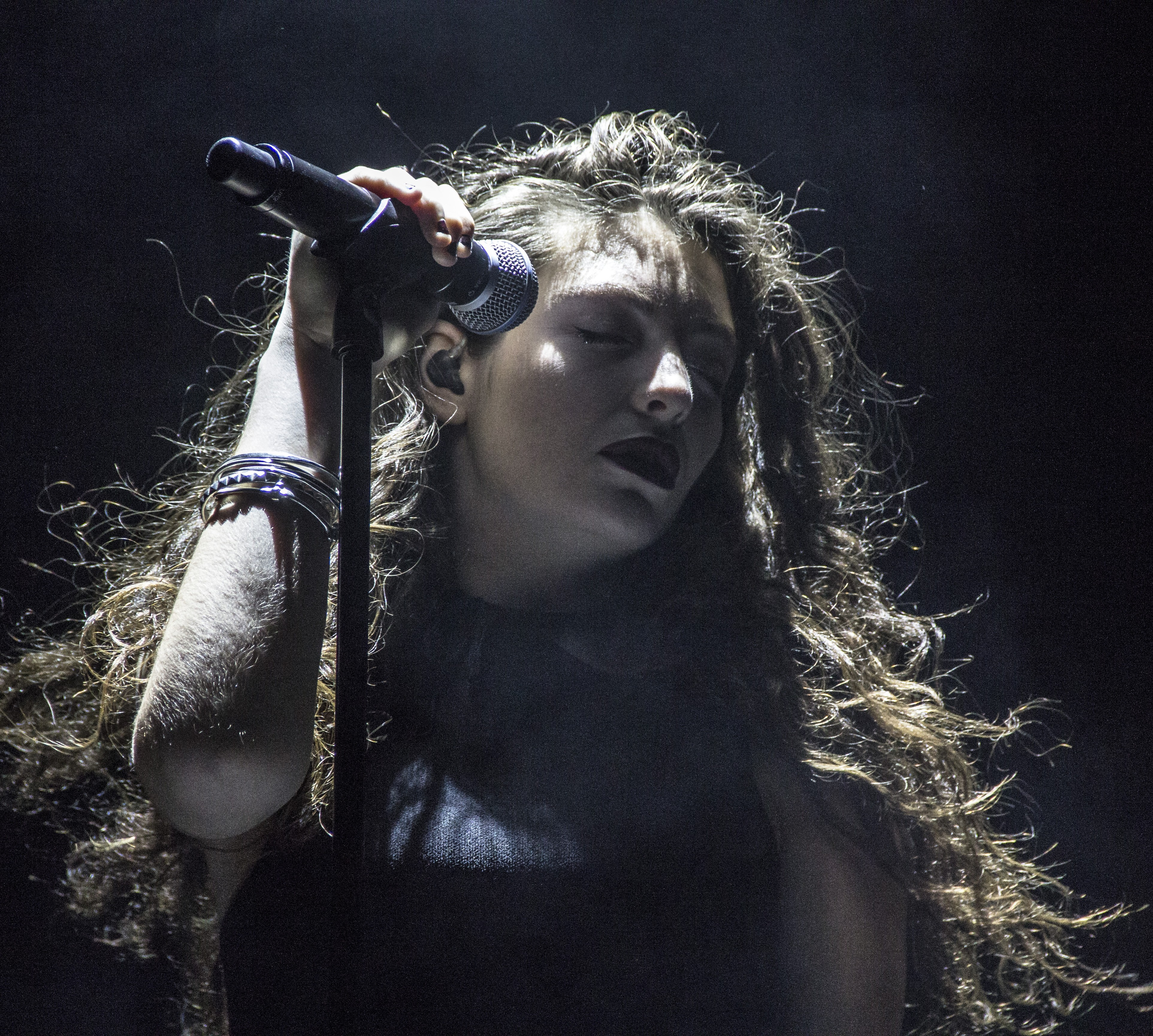 weeklydig